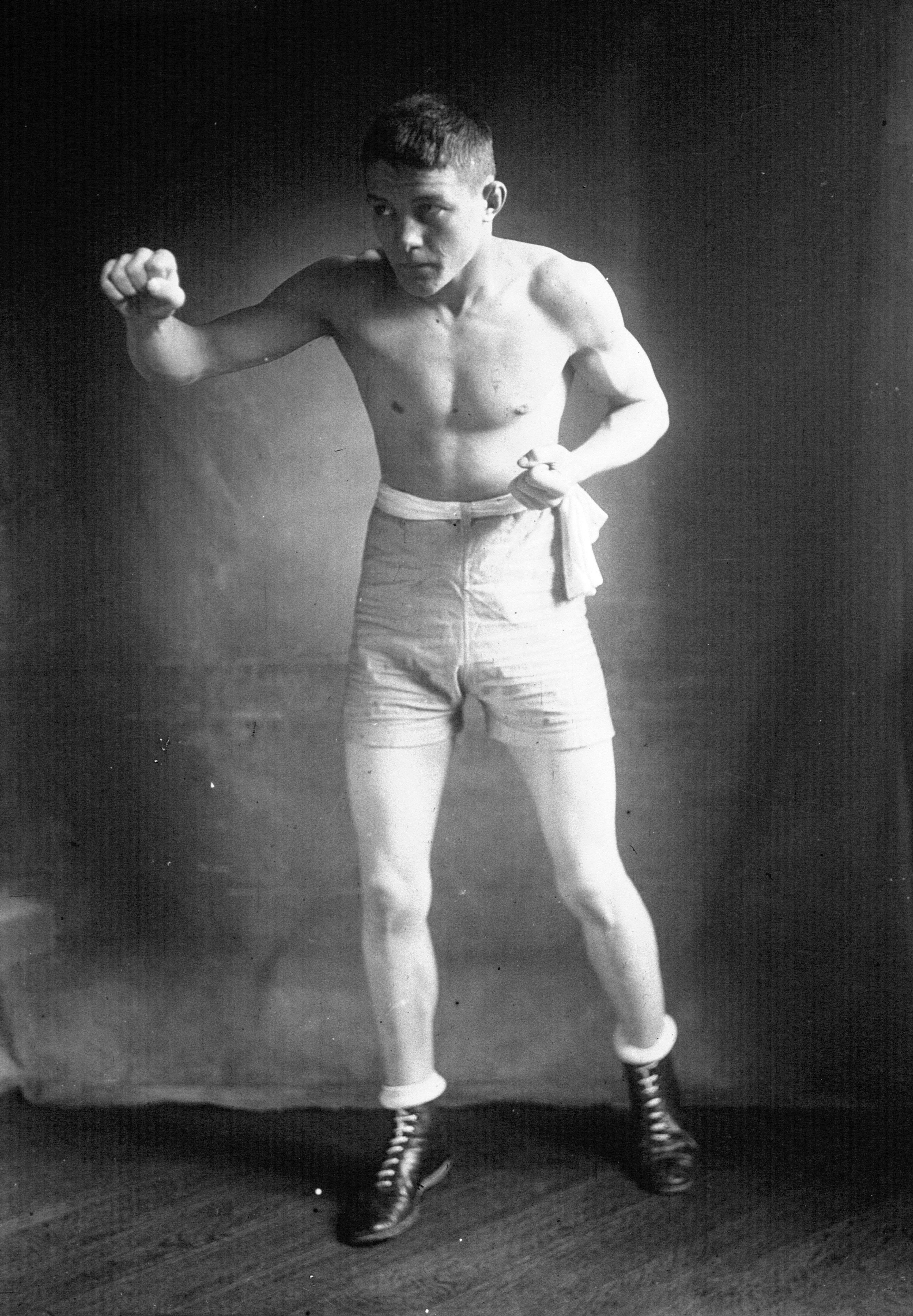 Boxeur français